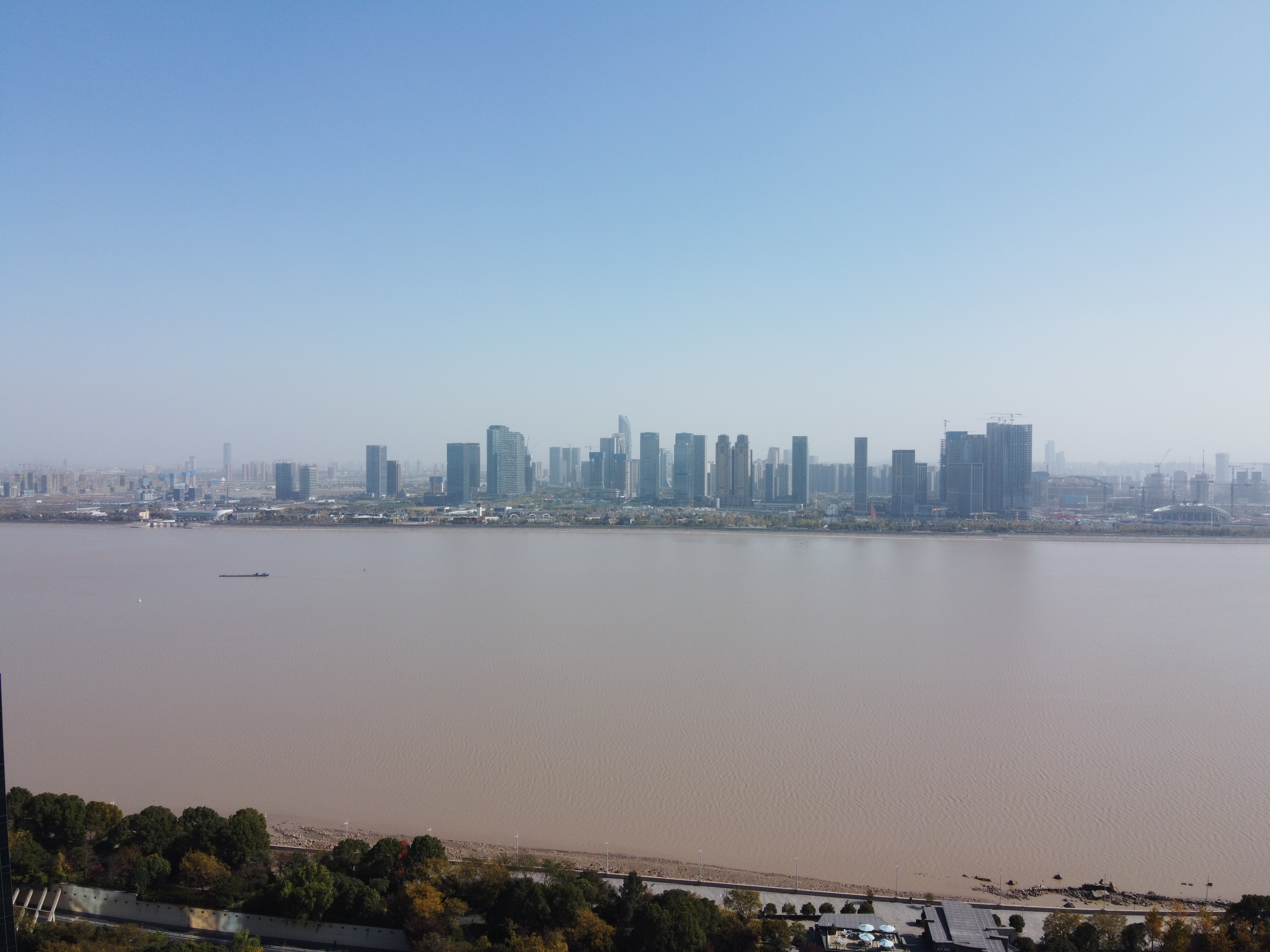 20191119从江北观看钱江世纪城